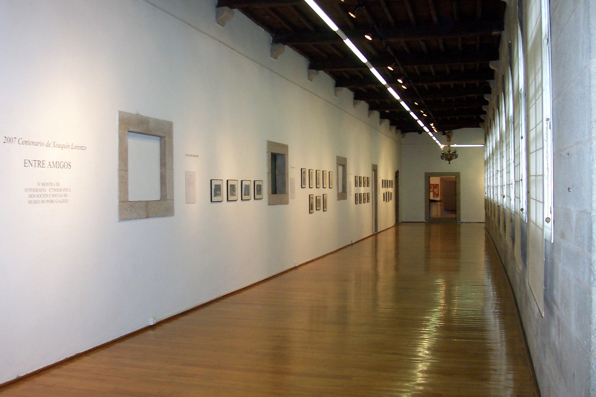 Pasillo do Museo do Pobo Galego, da planta de arriba.